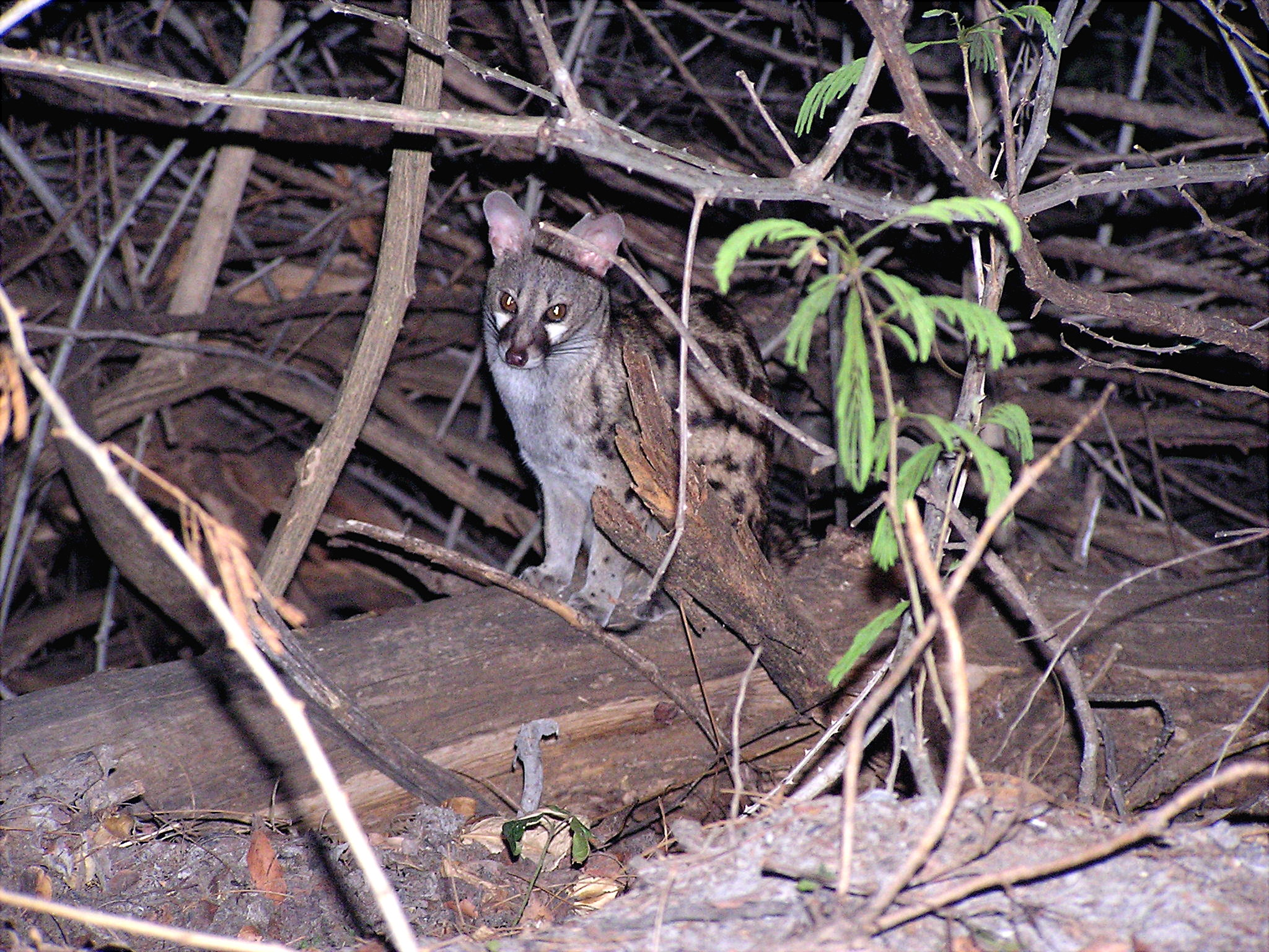 Small-spotted Genet, Krüger Nationalpark, Südafrika